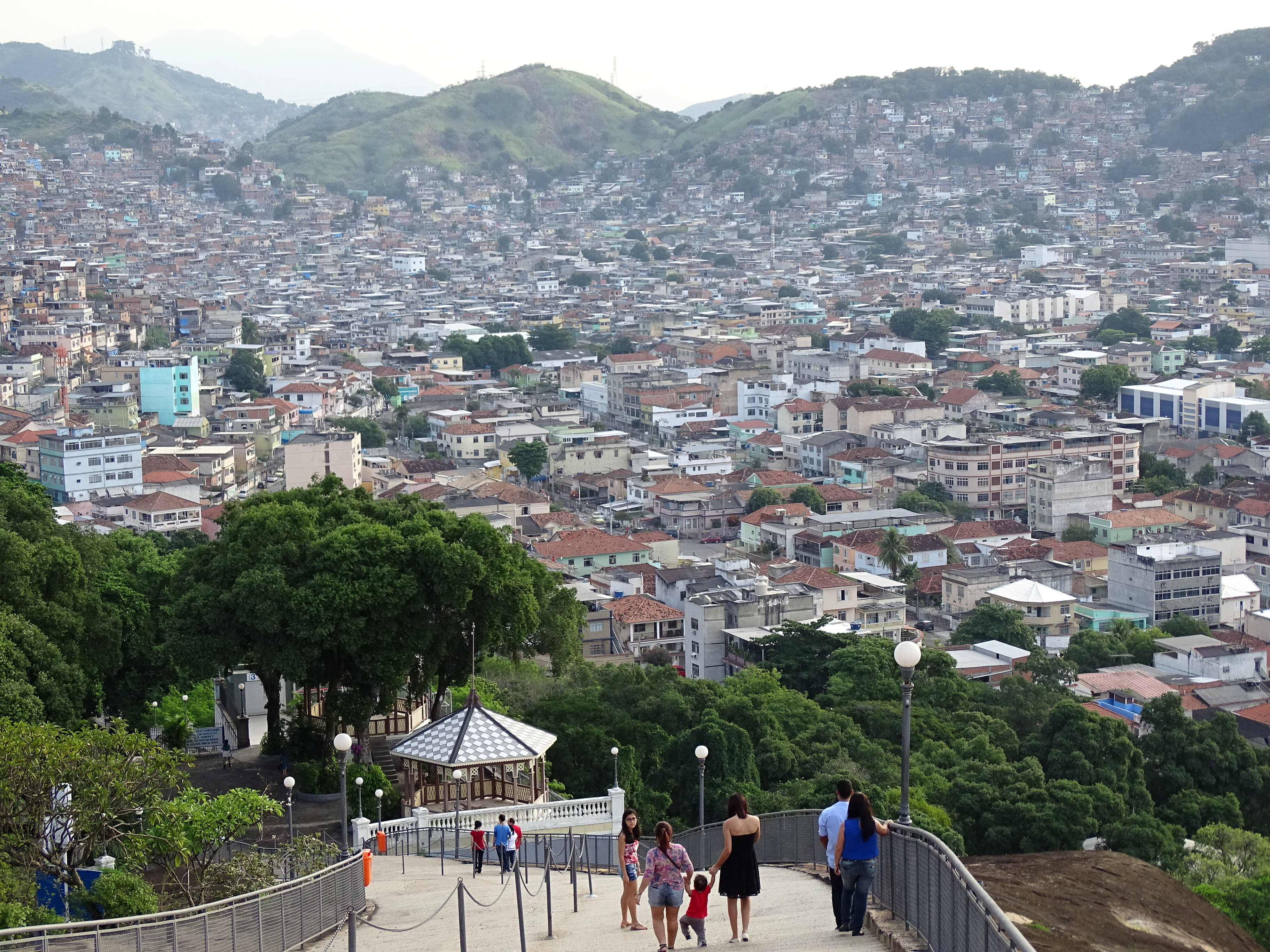 View over Complexo do Alemao (Favela) - From Igreja da Penha - Rio de Janeiro - Brazil - 02